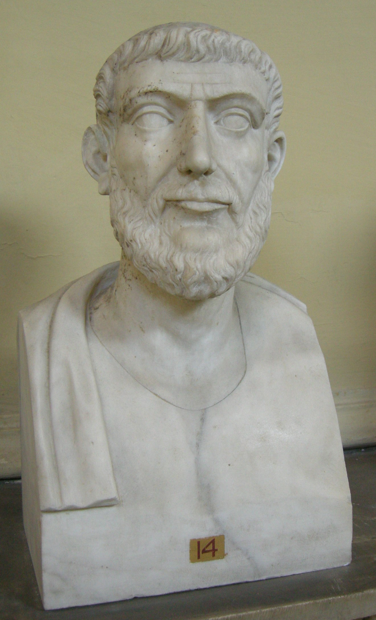 Musei vaticani, braccio chiaramonti, busto